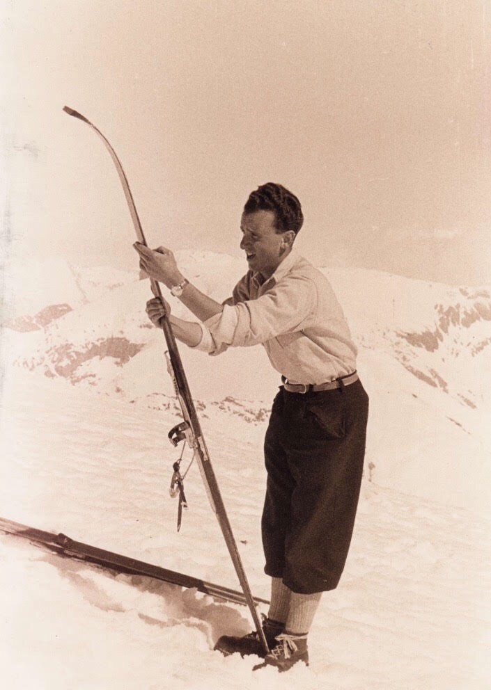 אנצו קאווליון בסקי בהרי האלפים